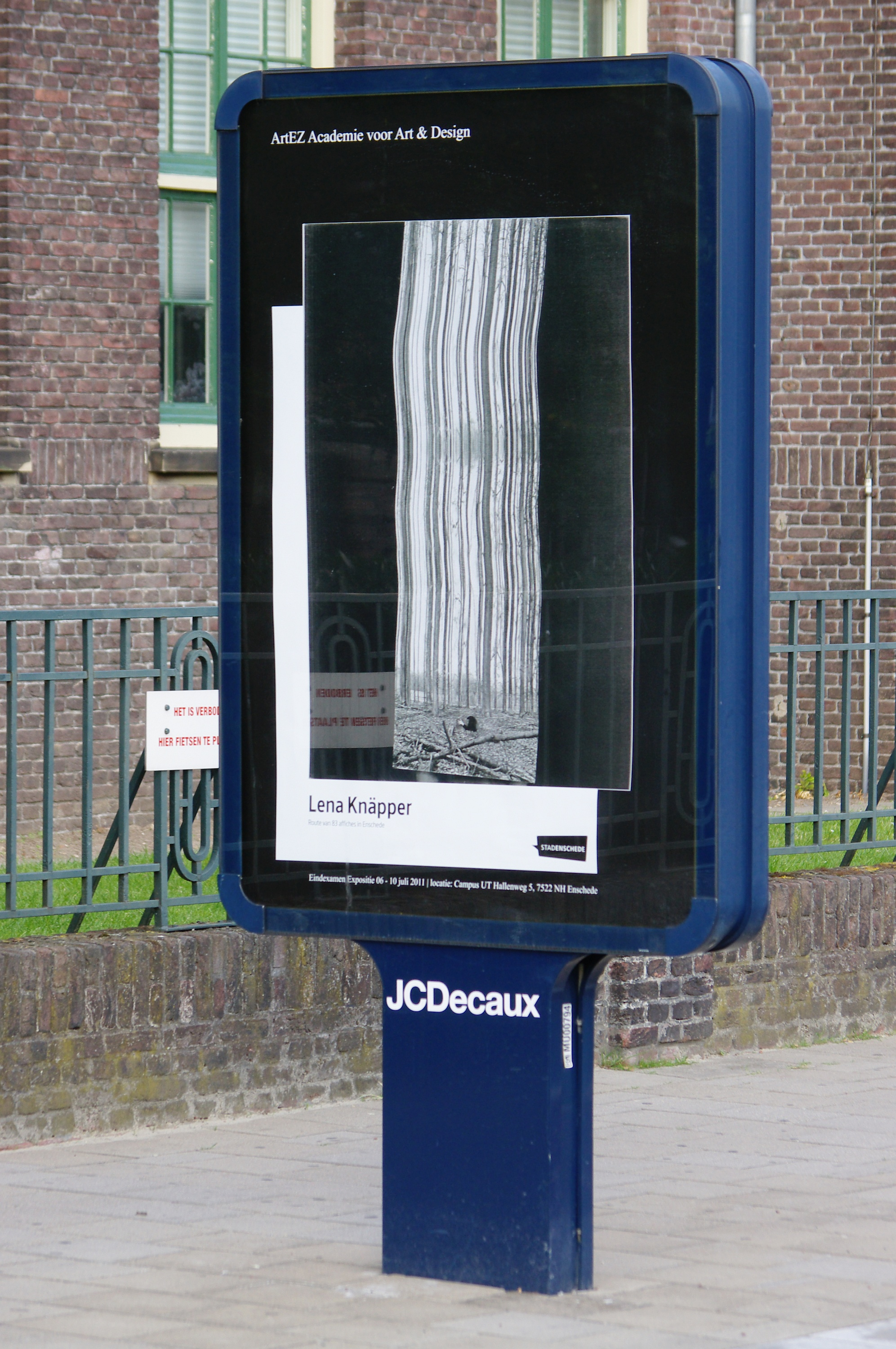 Stadtmöblierung/Außenwerbung in Enschede von JCDecaux. Die "Mupis" werden den Absolventen der ArteZ Akademie zur Verfügung gestellt.